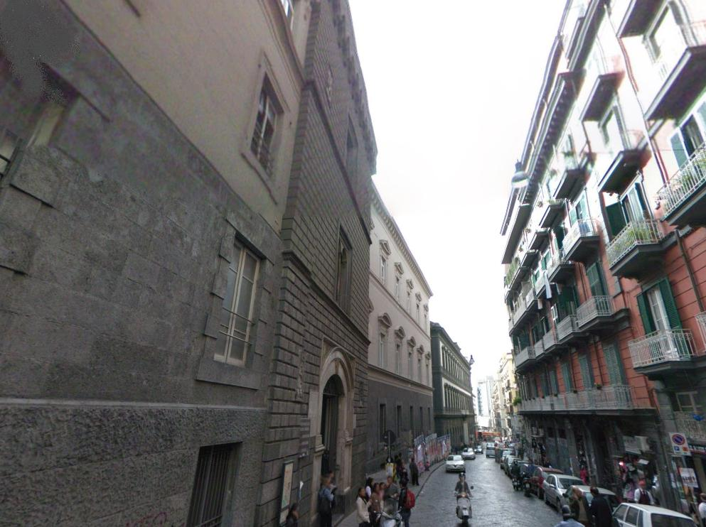 Particolare dell'ingresso del Real Museo di Scienze Mineralogiche.